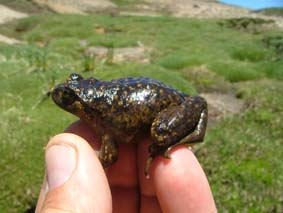 Adulto hembra del sapito del Pehuenche (Alsodes pehuenche)